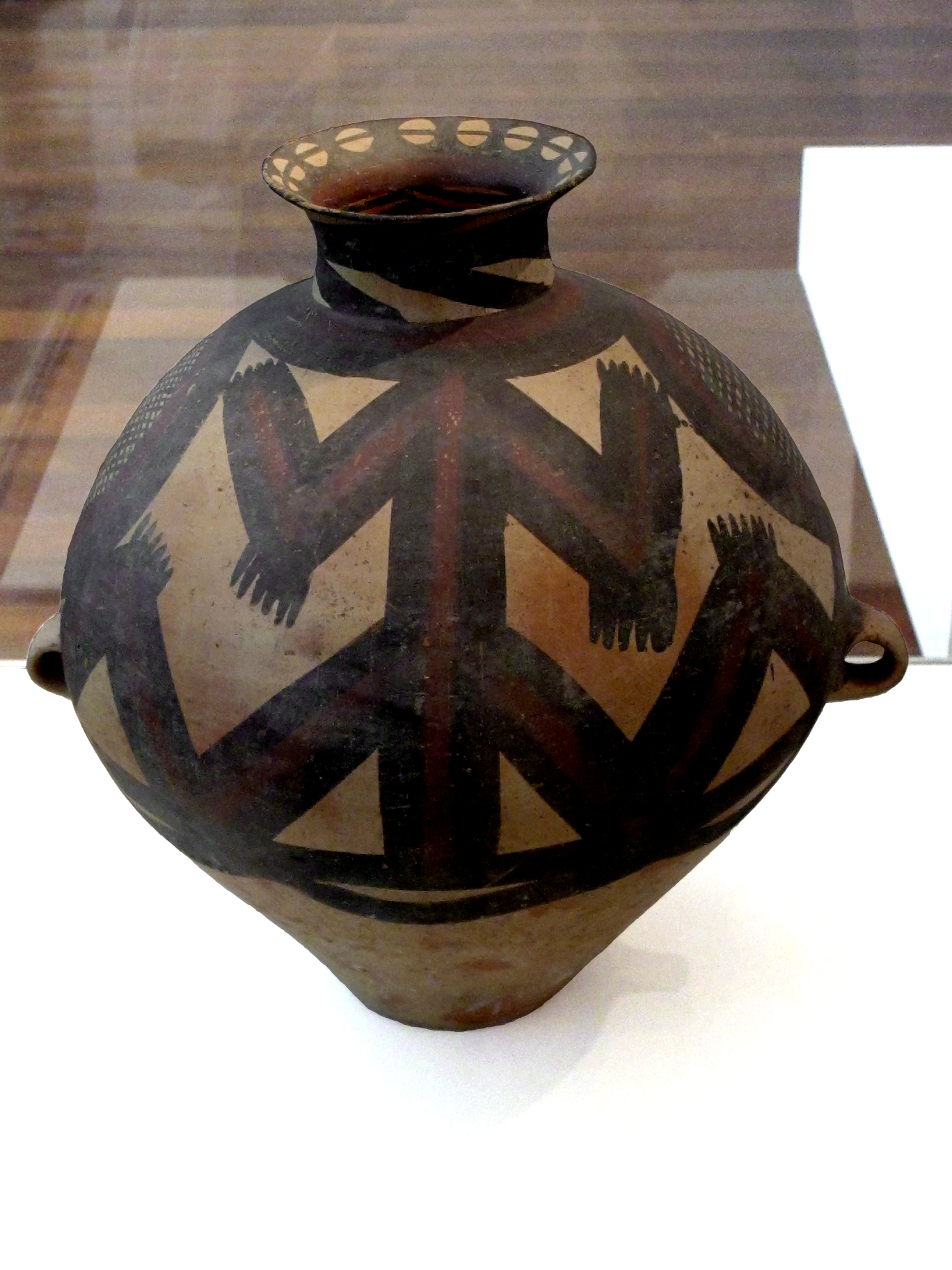 Grande jarre. Culture de Majiayao, phase de Machang, fin du IIIe millénaire av.n.è. Terre cuite rosée, peinte en rouge et brun. Musée Guimet. MA 5925. Référence: Jean-Paul Desroches et Marie-Catherine Rey, Chine des origines, RMN 1994, ISBN 2-7118-2915-4, p. 48-49.